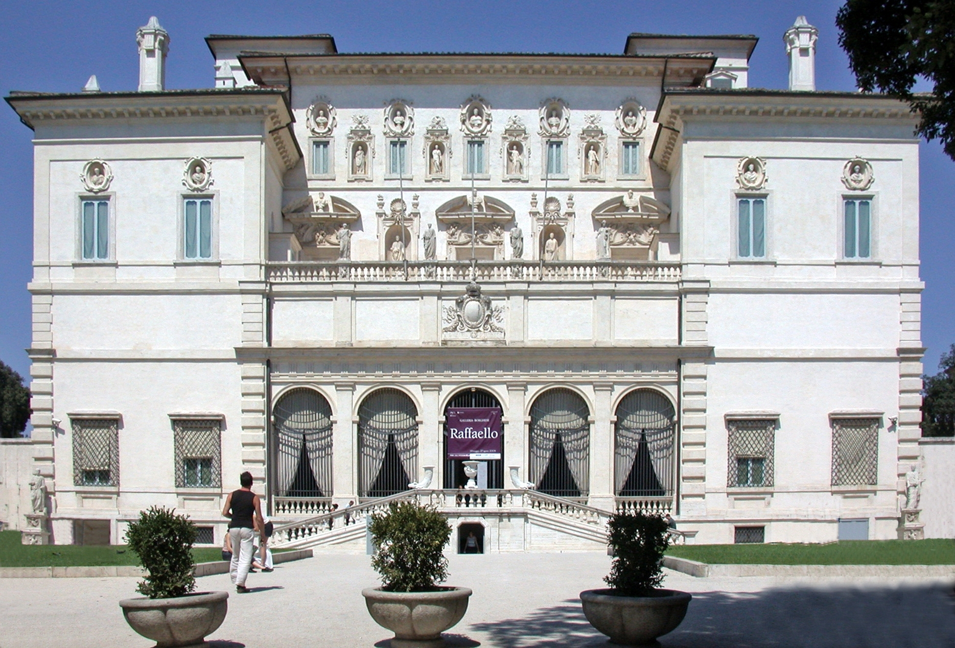 Roma, Villa Borghese, Galleria Borghese, facciata.